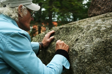 E. Taniloo oma Kudina mõisa pargis olevat skulptuuri signeerimas